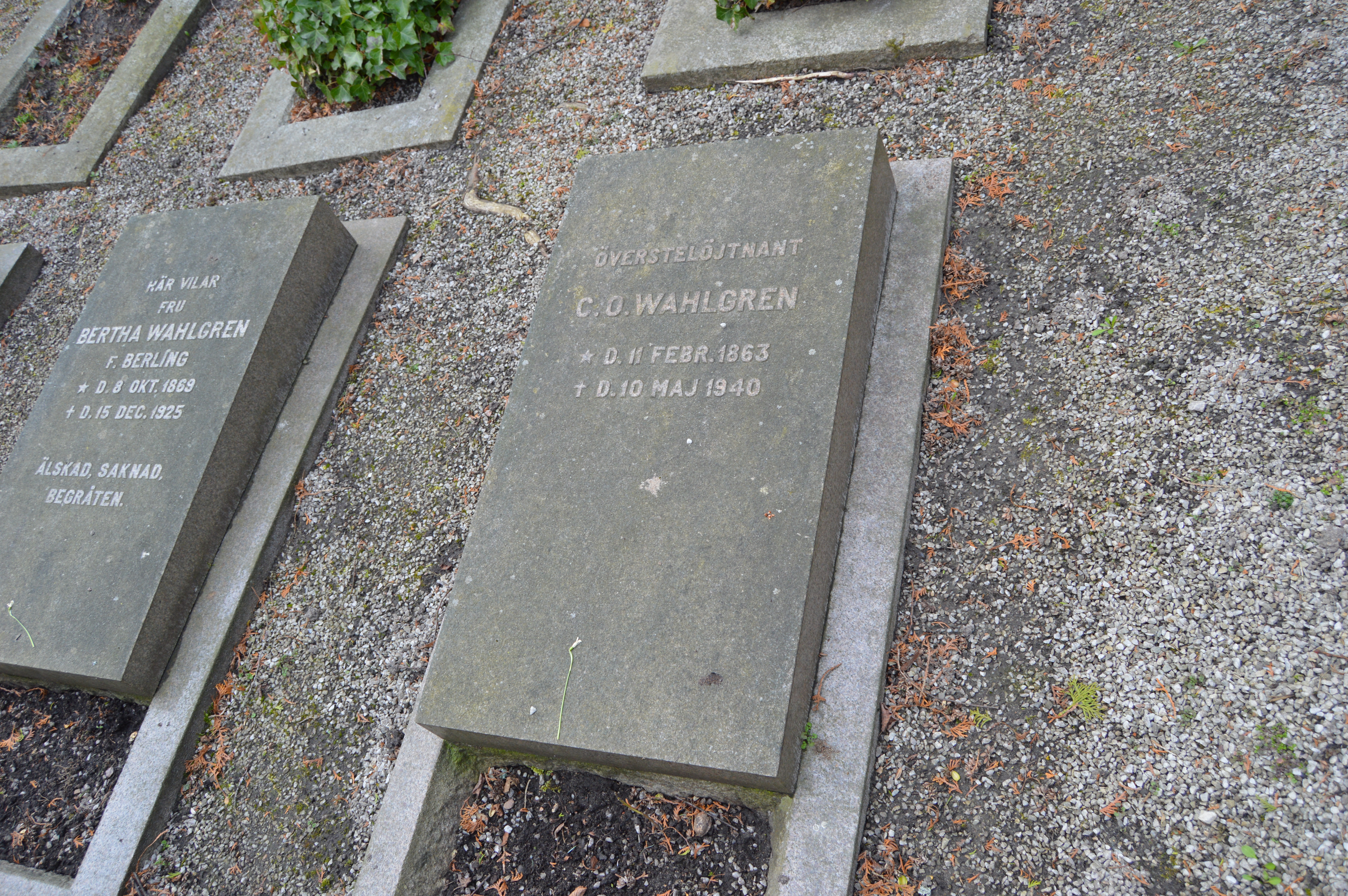 Carl Olof Wahlgrens (1863-1940) grav på Östra Kyrkogården i Lund.